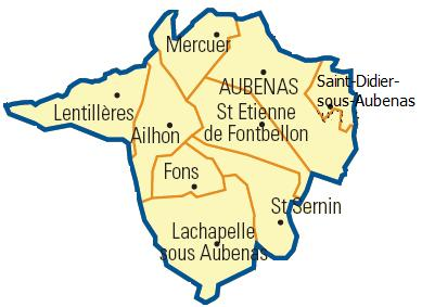 Carte détaillée des communes du canton (Ardèche)